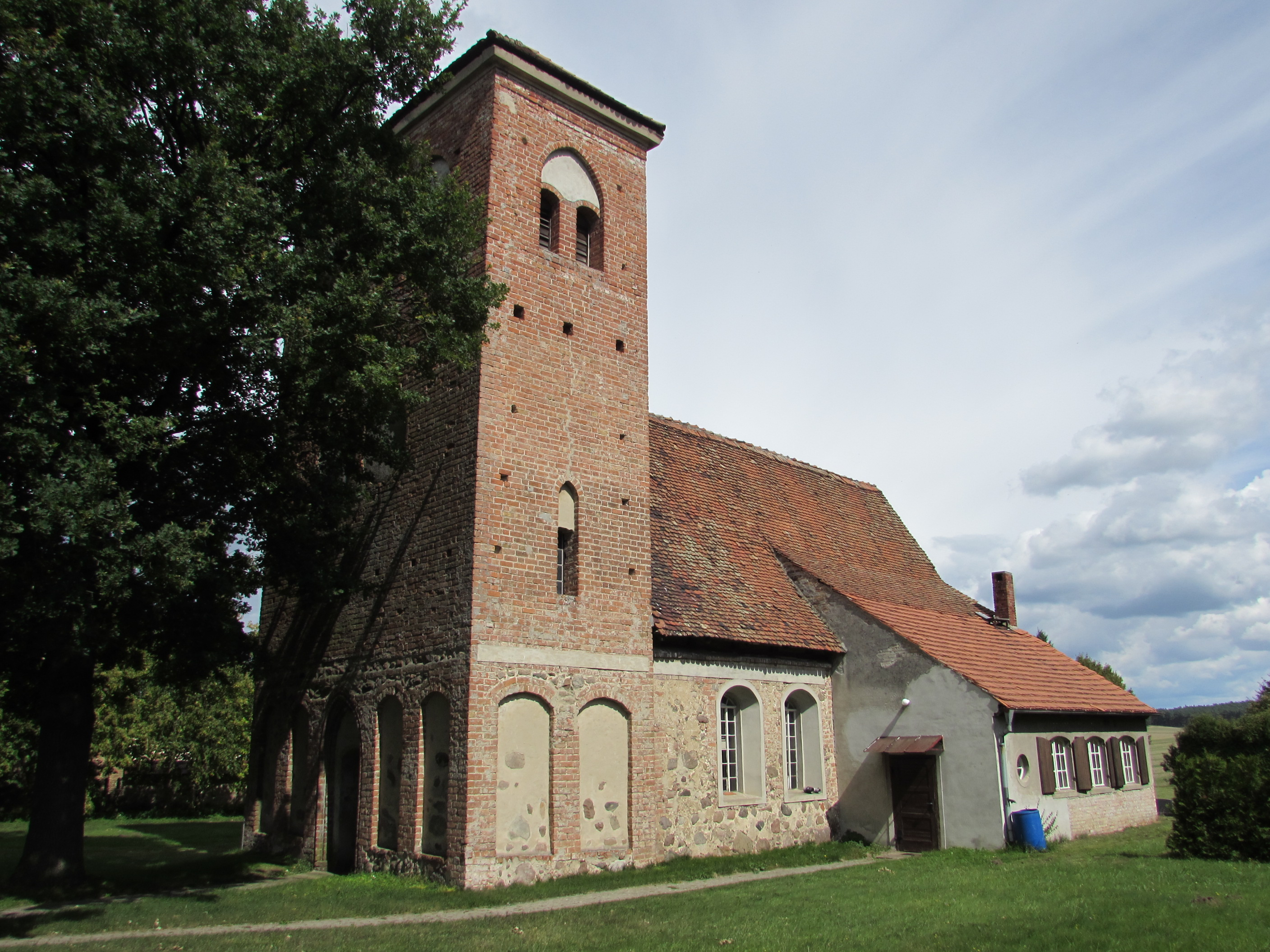 kirche marzahne südwest